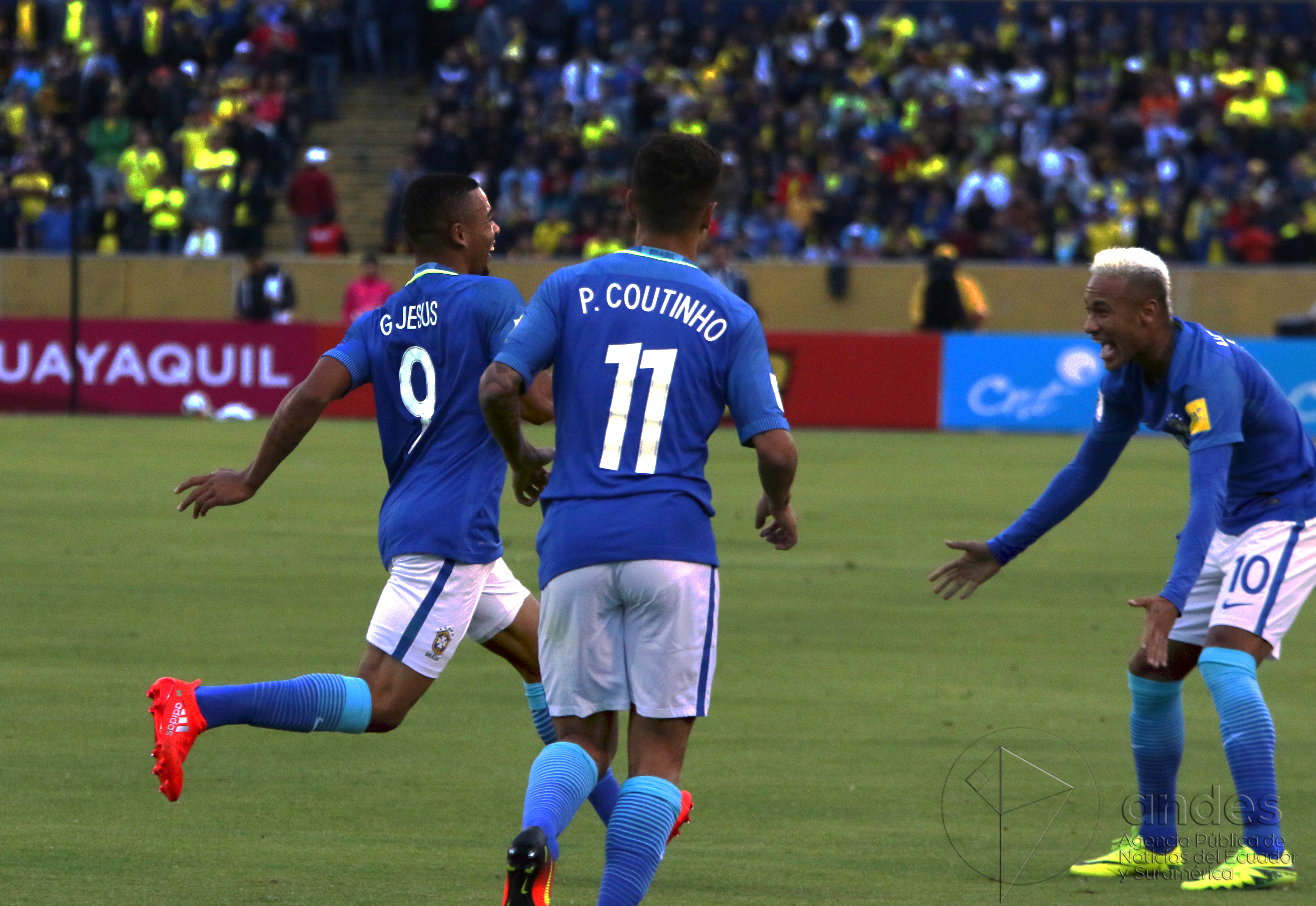 BRASIL 2 MAV